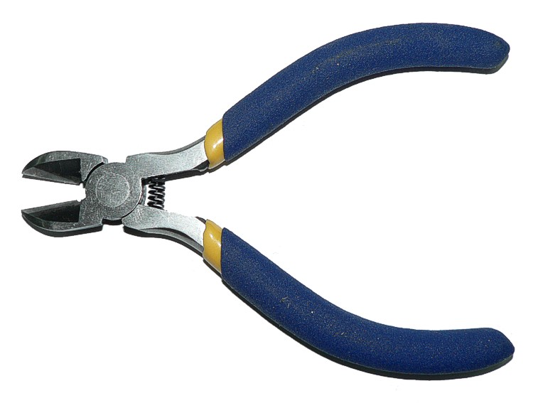 cutter